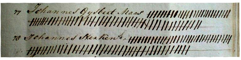 Resultaat van het stemmen in Lieshout op een burgervader 1795